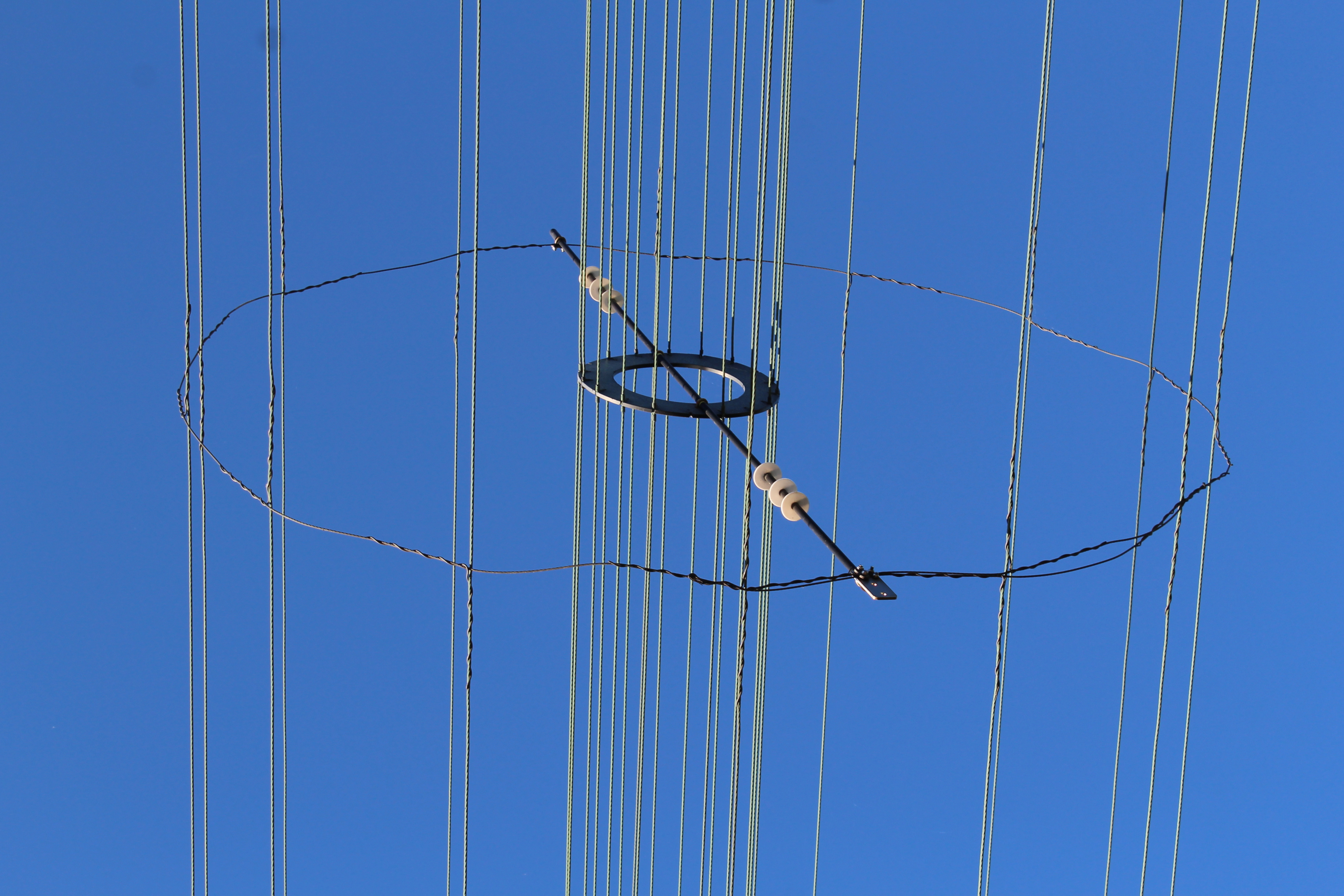 Langwellensender Europe 1, Detail der Reusenleitung